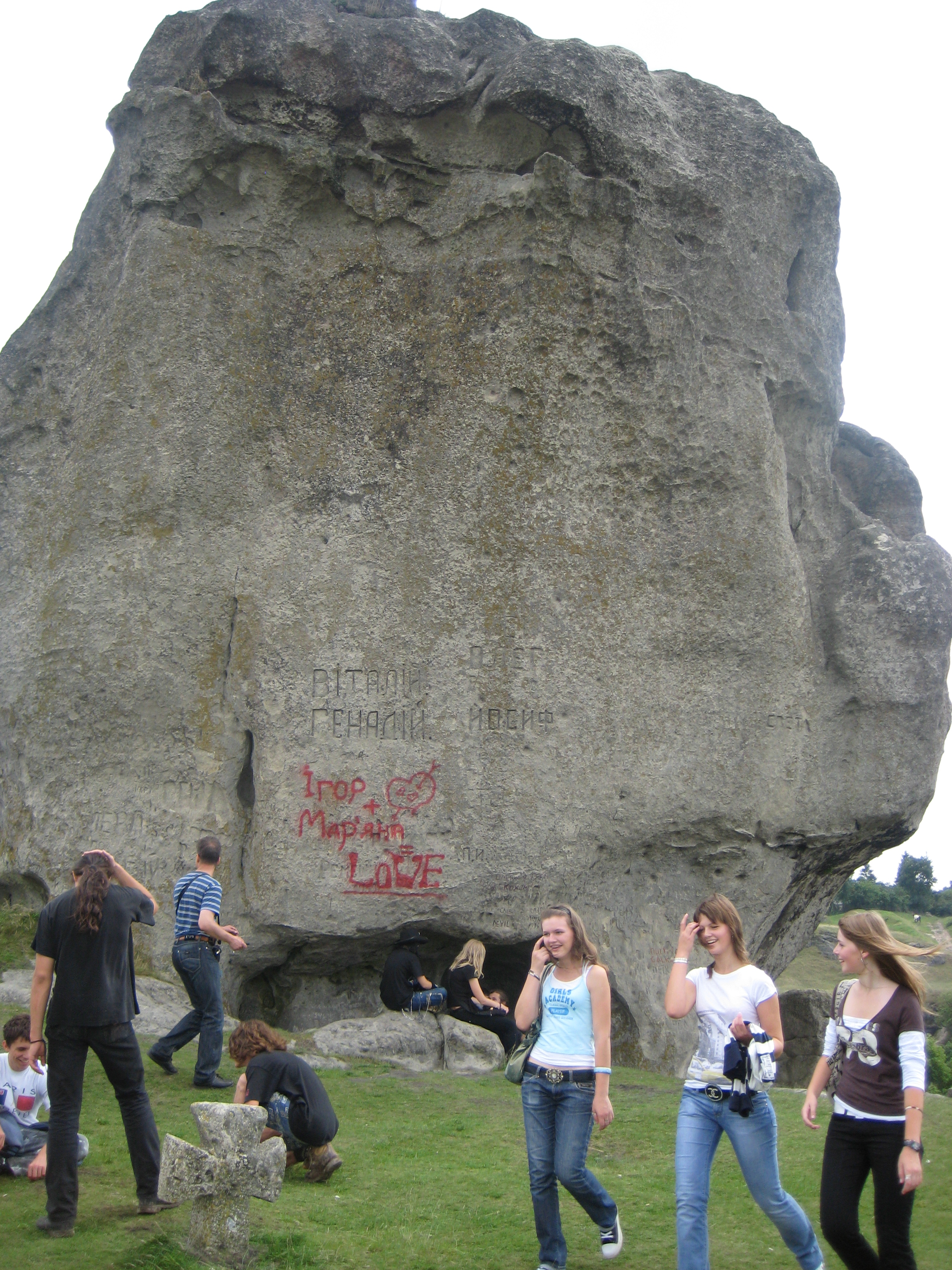 Під час фестивалю